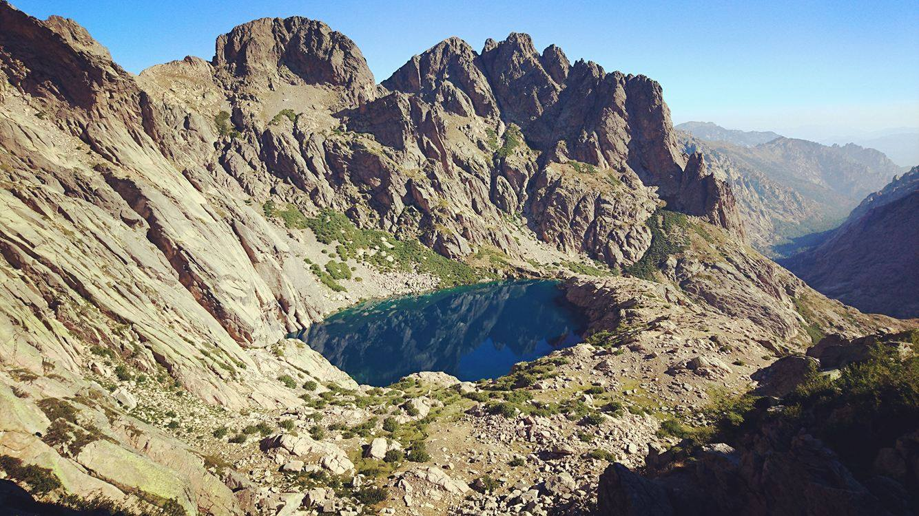 Étage alpin au lac de Capitellu